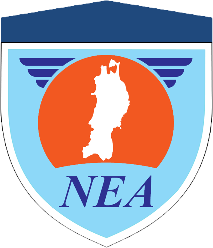 陸上自衛隊 東北方面隊 部隊章